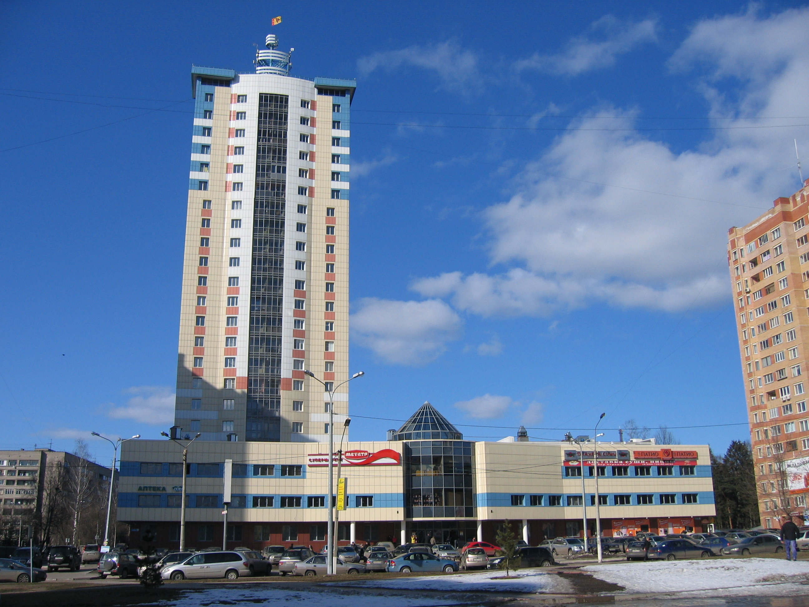 Новый жилой дом и торговый центр в Юбилейном